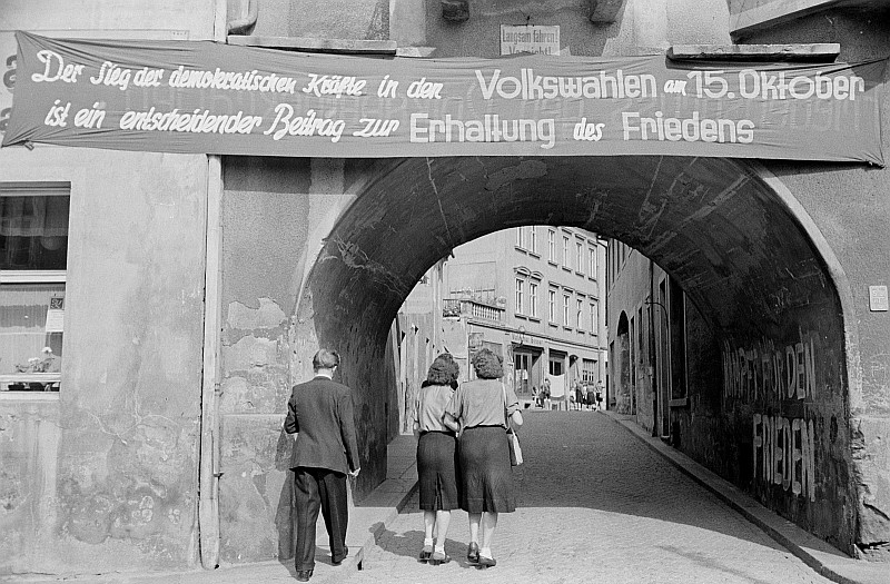 Original image description from the Deutsche Fotothek Drei Menschen gehen durch das mit einem Banner für die Volkswahlen und Friedensparole versehene Klostertor in Kamenz (Sachsen)